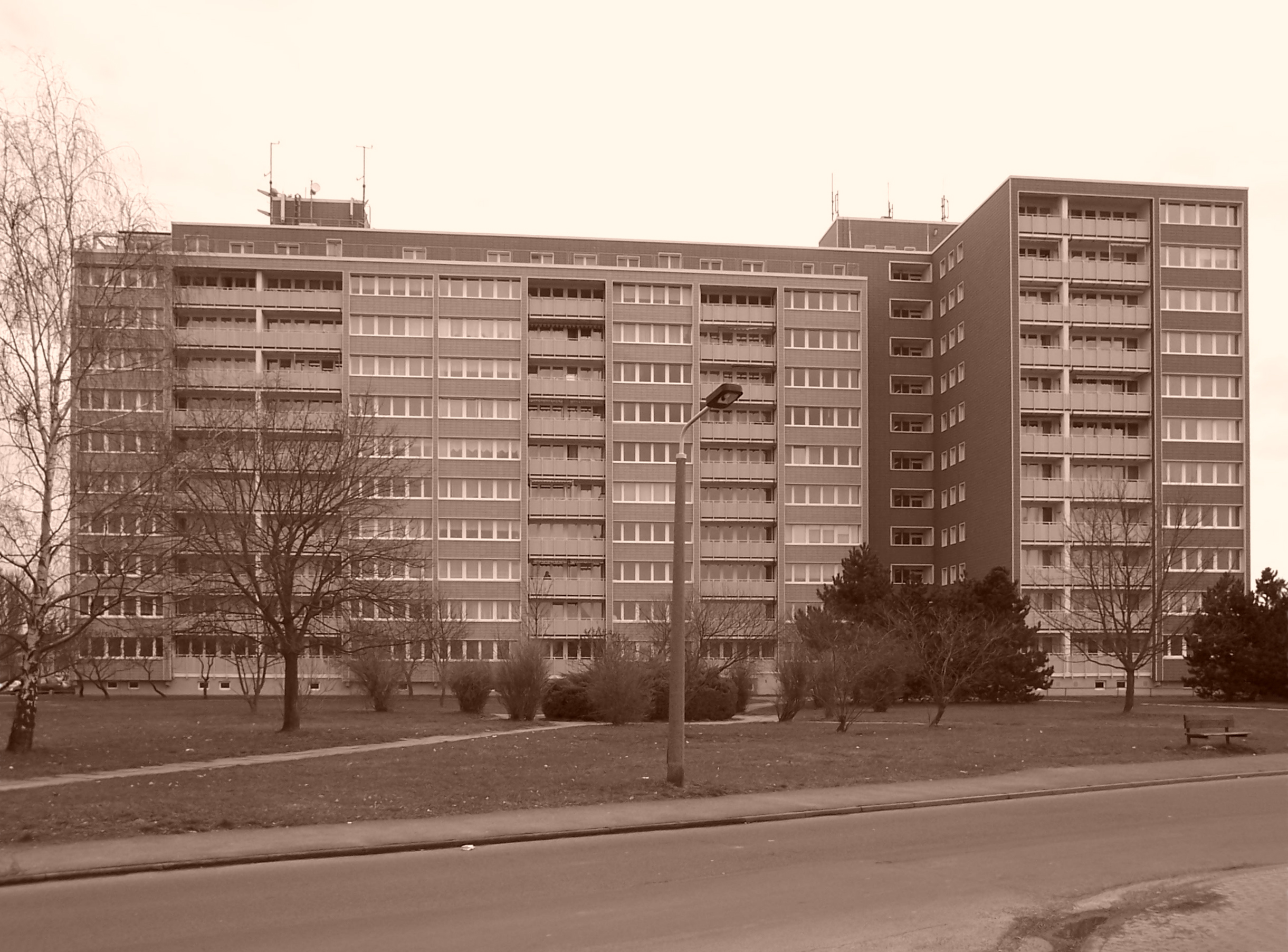 Hochhaus in Eilenburg, Stadtteil Ost, aufgenommen in Sepia